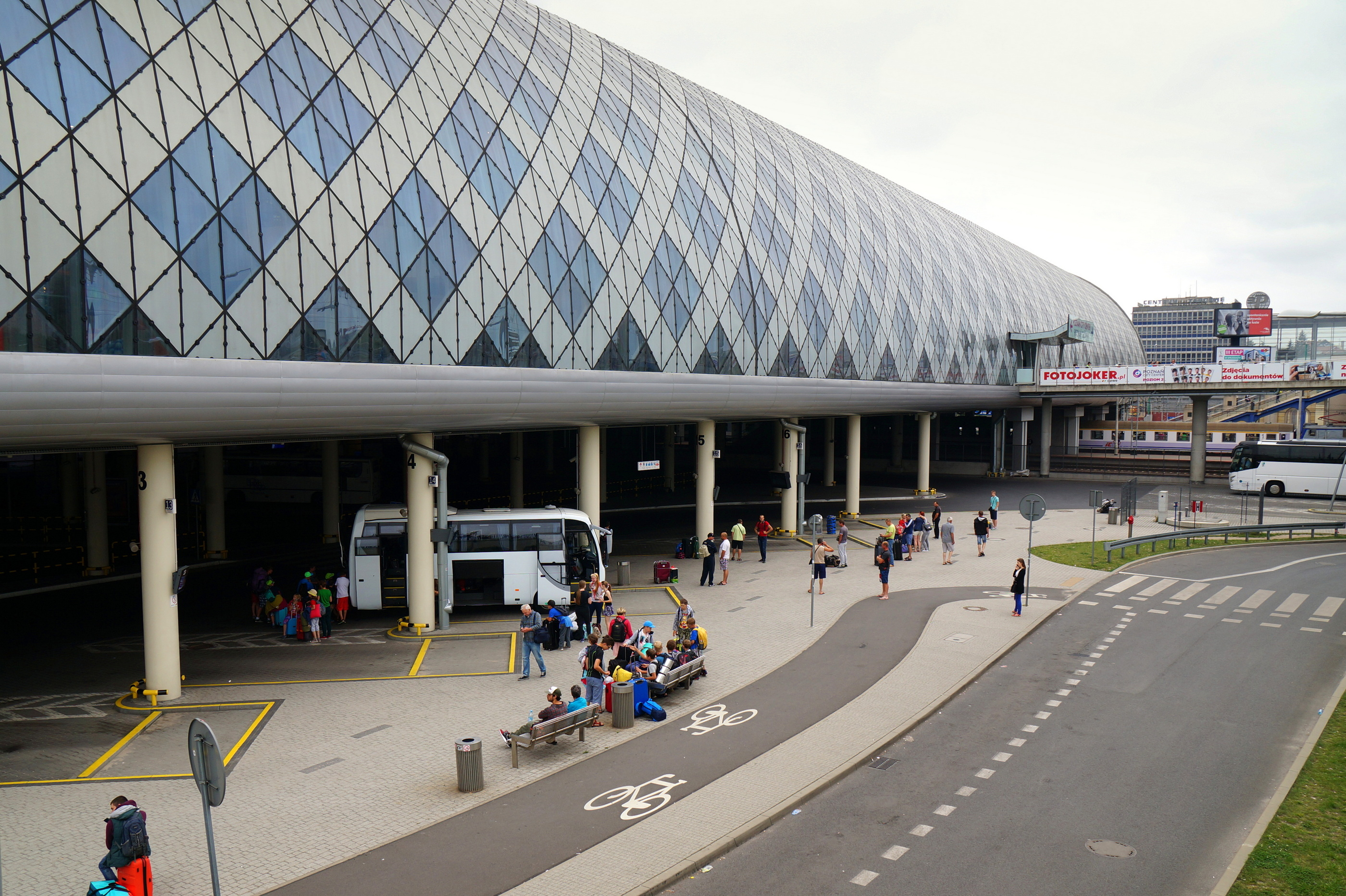 Poznań City Center, centrum handlowe z dworcem kolejowym i autobusowym w 2013 r. otrzymał antynagrodę "Makabryły Roku"